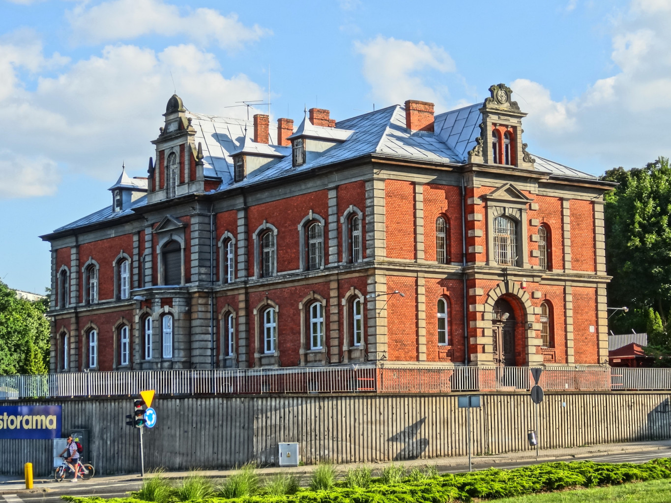 Wojskowa Komenda Uzupełnień w Bydgoszczy, ul. Szubińska 1 (1884), dawniej dom dla samotnych kobiet